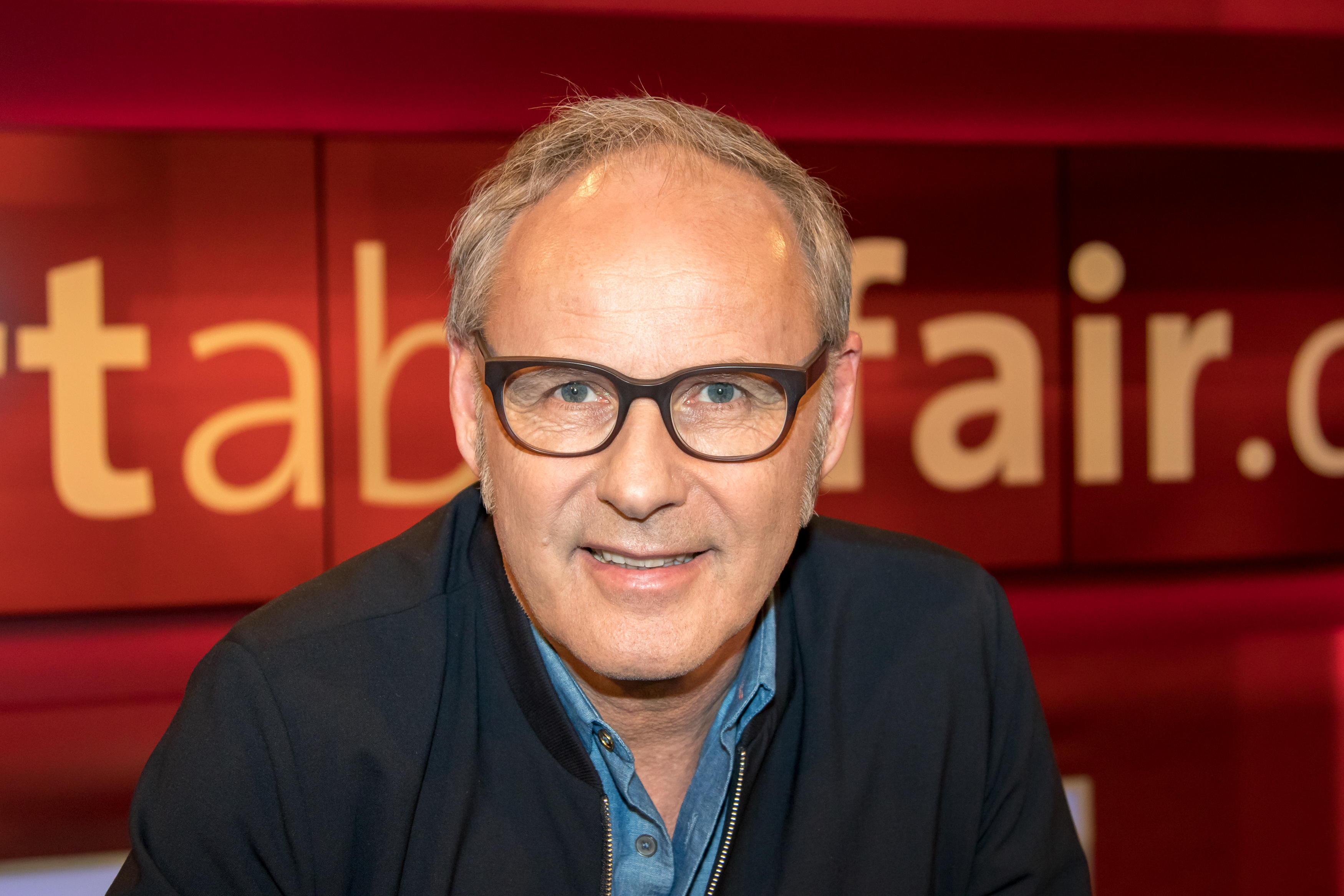 Reihnold Beckmann in der WDR-Sendung "hart aber fair" am 3. April 2017